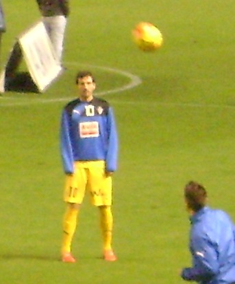 Arruabarrena, jugador del Eibar.